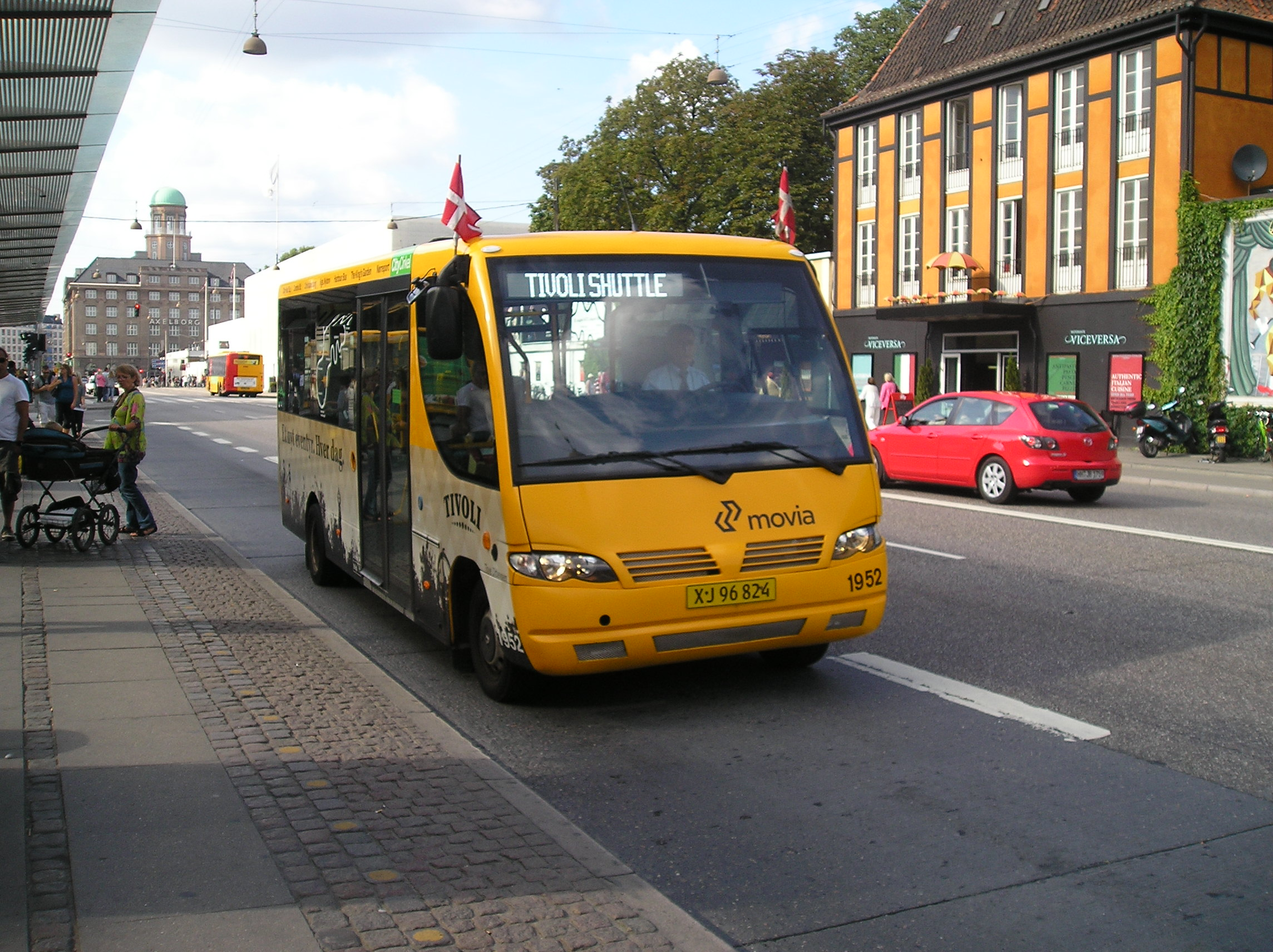 The shortlived Copenhagen busline Tivoli Shuttle at Københavns Hovedbanegård.